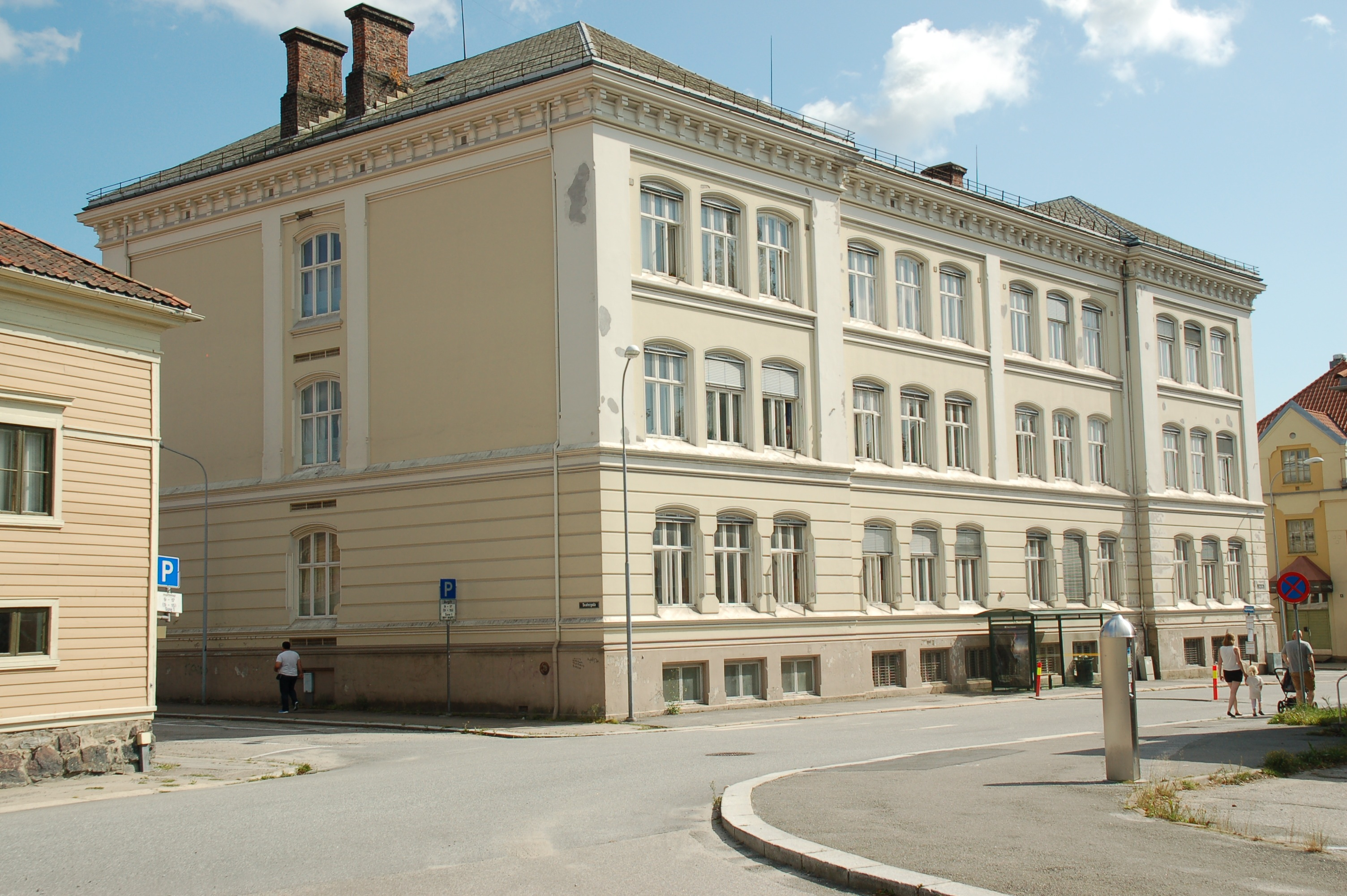 Halden bibliotek fra 1985, tidligere Sentrum skole fra 1970, tidligere Gutteskolen